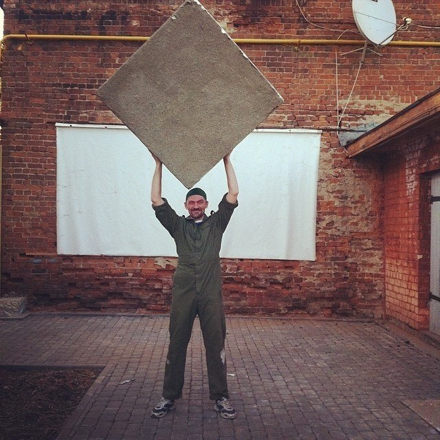 Фрол Веселый Самарский литературный музей